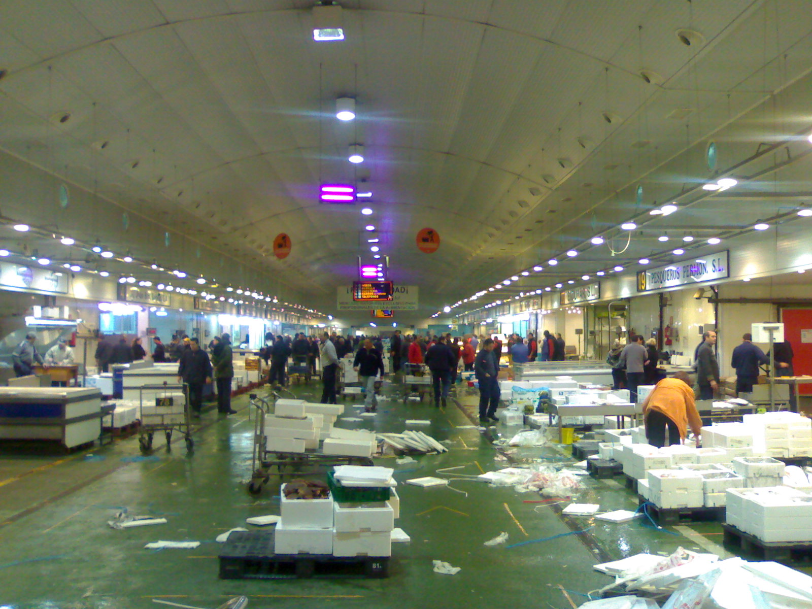 Interior de Mercavalencia. 4 de diciembre de 2007